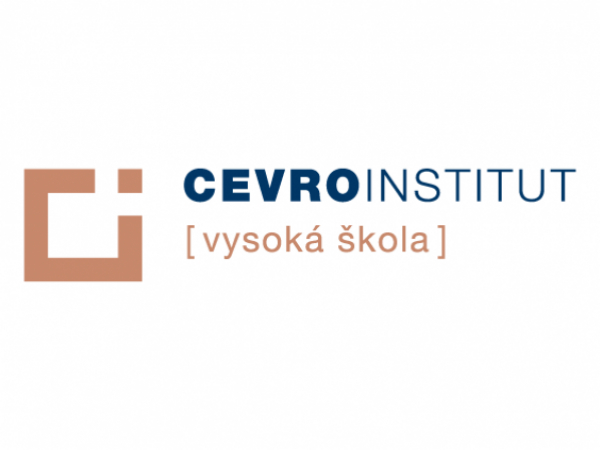 logo CI